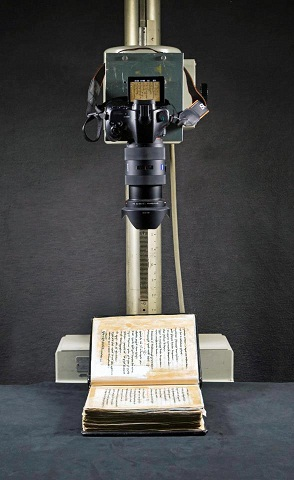 ხელნაწერი წიგნის დიგიტალიზაციის პროცესი ხელნაწერთა ეროვნულ ცენტრში